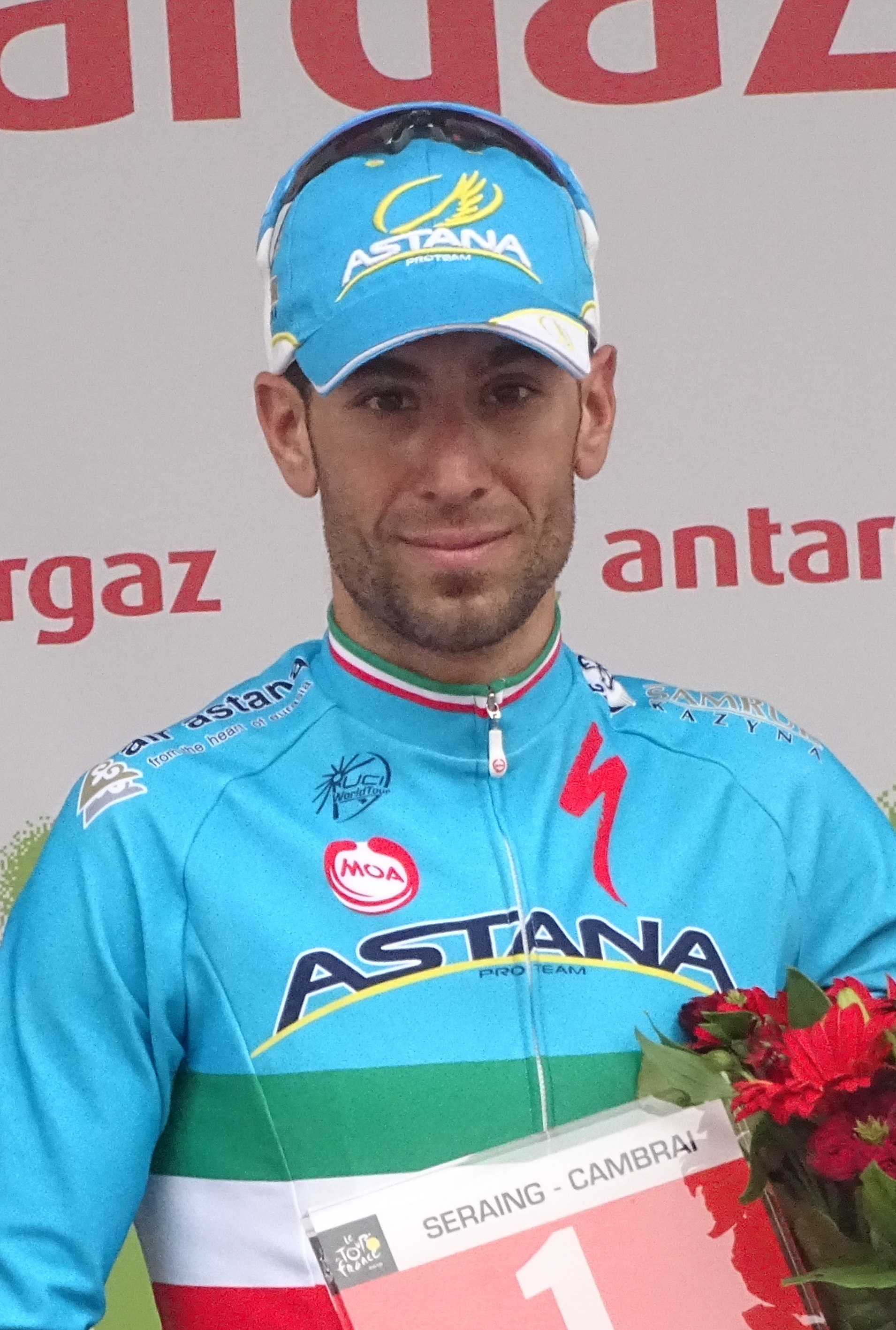 Reportage réalisé le mardi 7 juillet à l'occasion de l'arrivée de la quatrième étape du Tour de France 2015 à Cambrai, Nord-Pas-de-Calais, France.